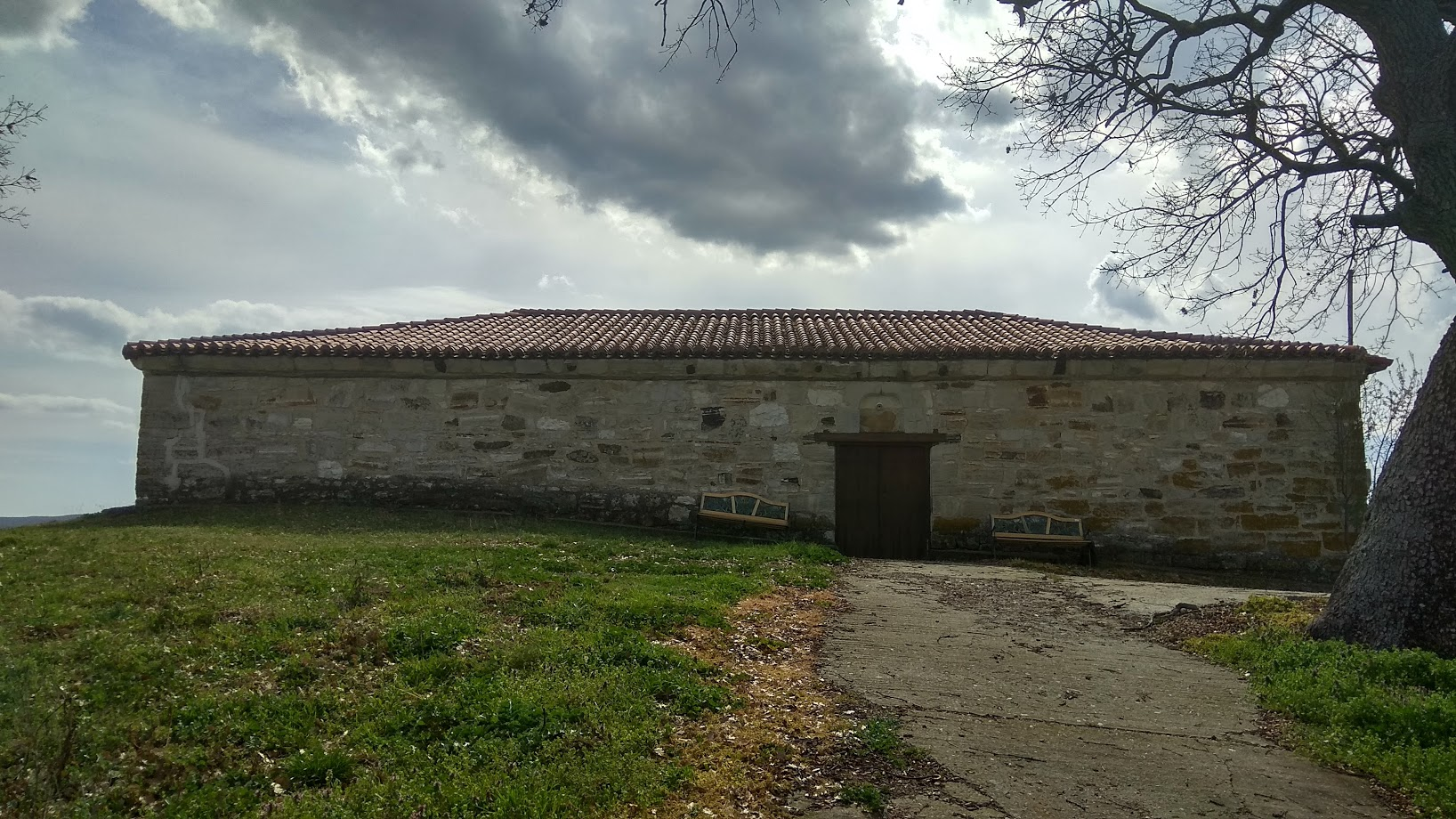 Ο μεταβυζαντινός ναός Αγίου Αθανασίου στο Αλεποχώρι Έβρου